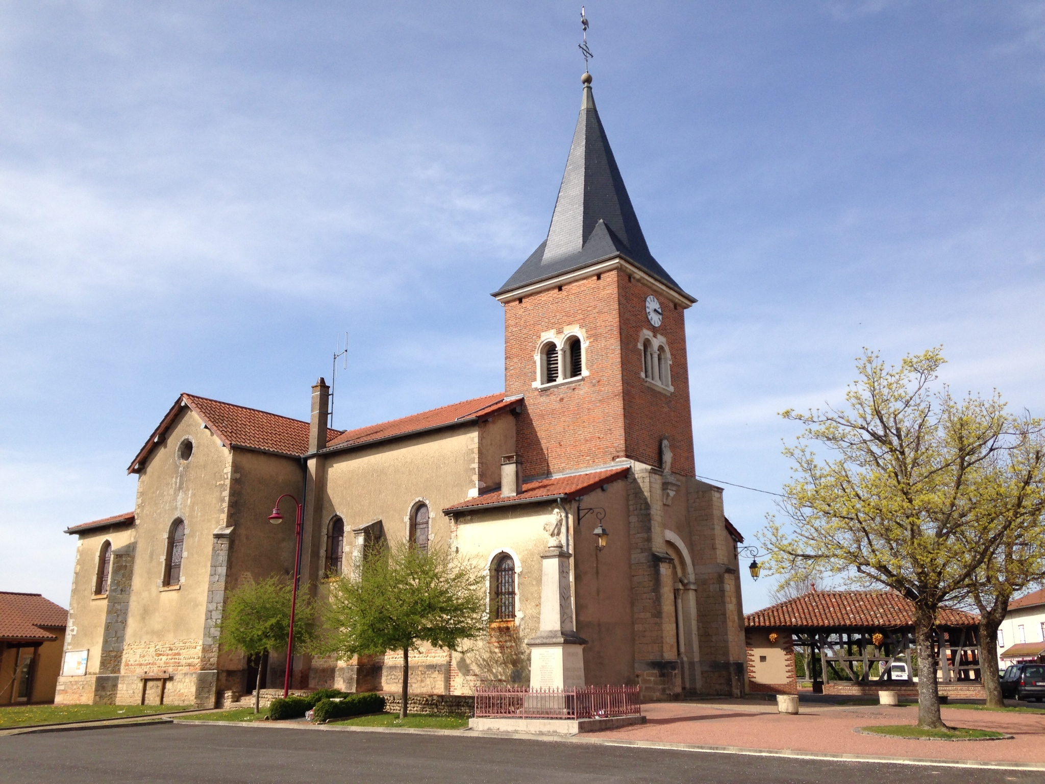 Église du village de Sulignat